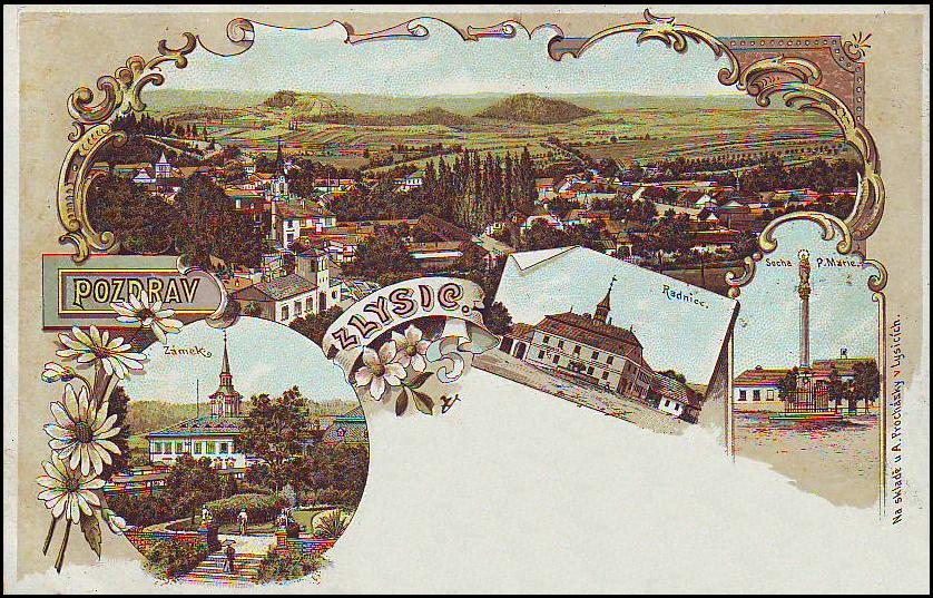 Lysice v roce 1899 či krátce před tímto datem